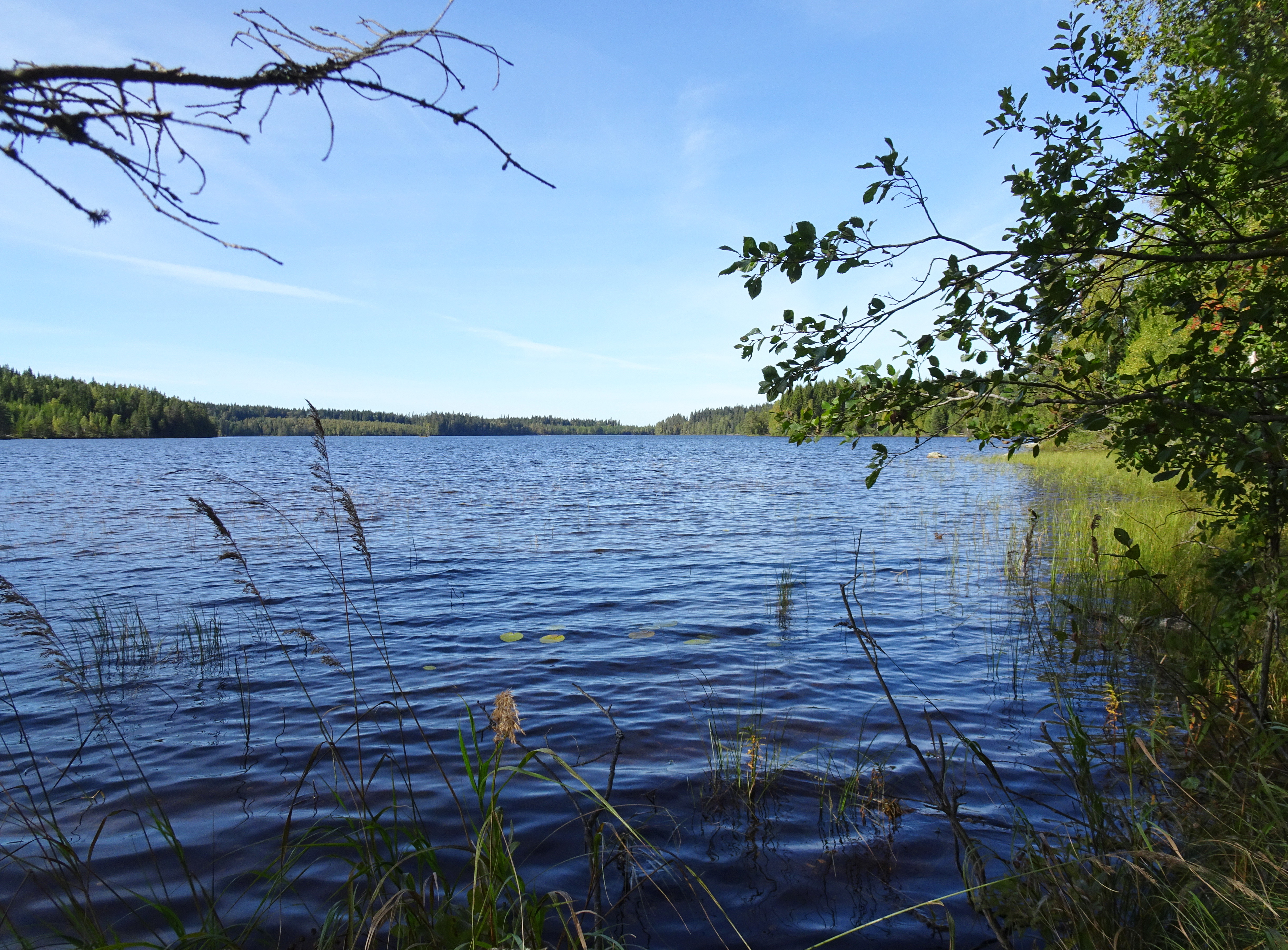 Gammelgårdssjön från norr